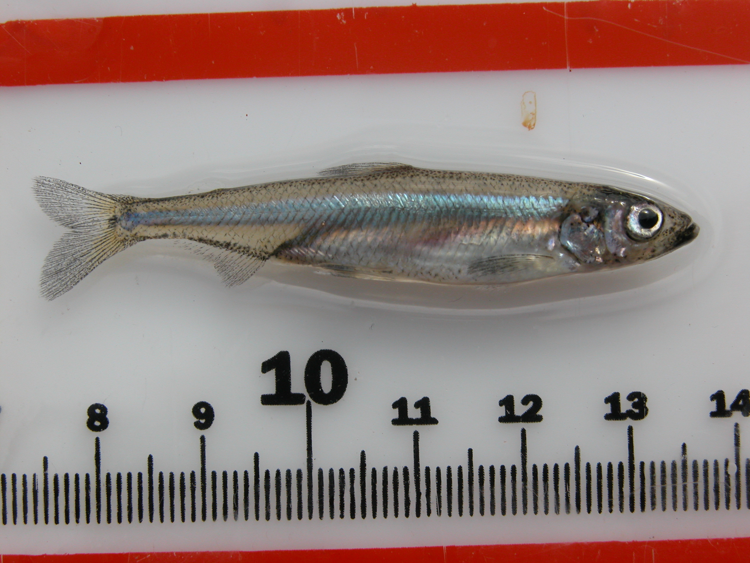 DS ruler